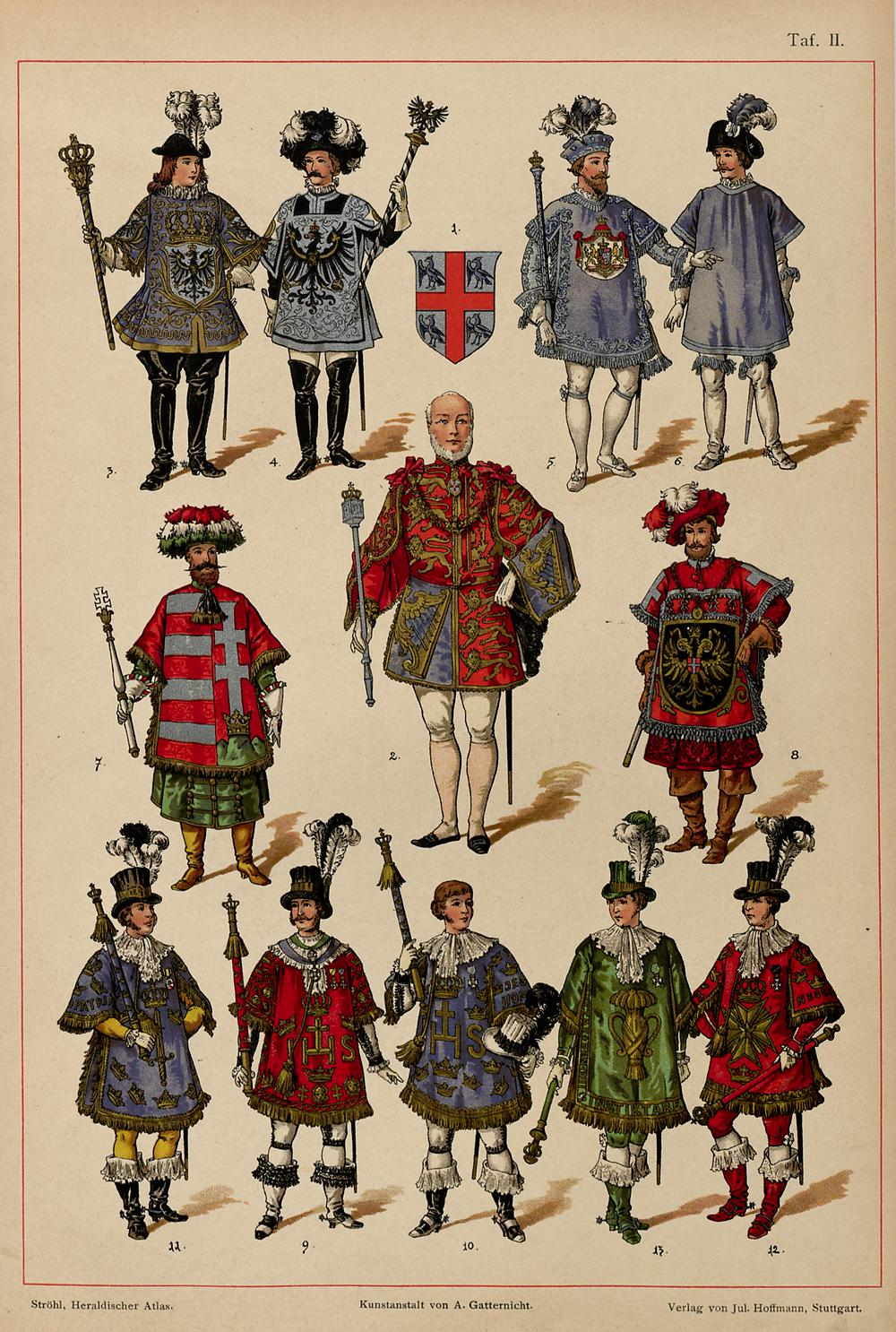 Hugo Gerhard Ströhl: "Heraldischer Atlas". Stuttgart 1899. Tafel 2, "Herolde aus dem 18. und 19. Jahrhundert", Tafel